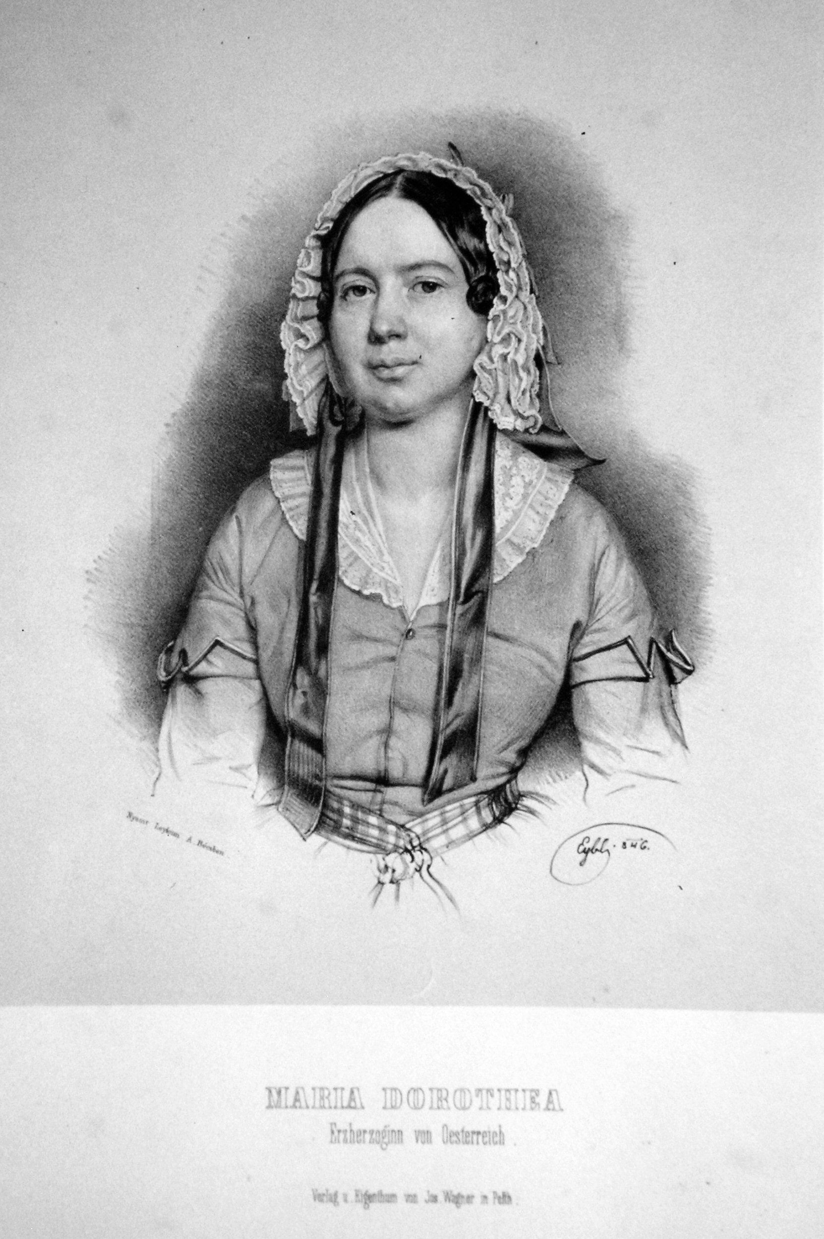 Maria Dorothea von Württemberg, Porträtlithographie von Franz Eybl